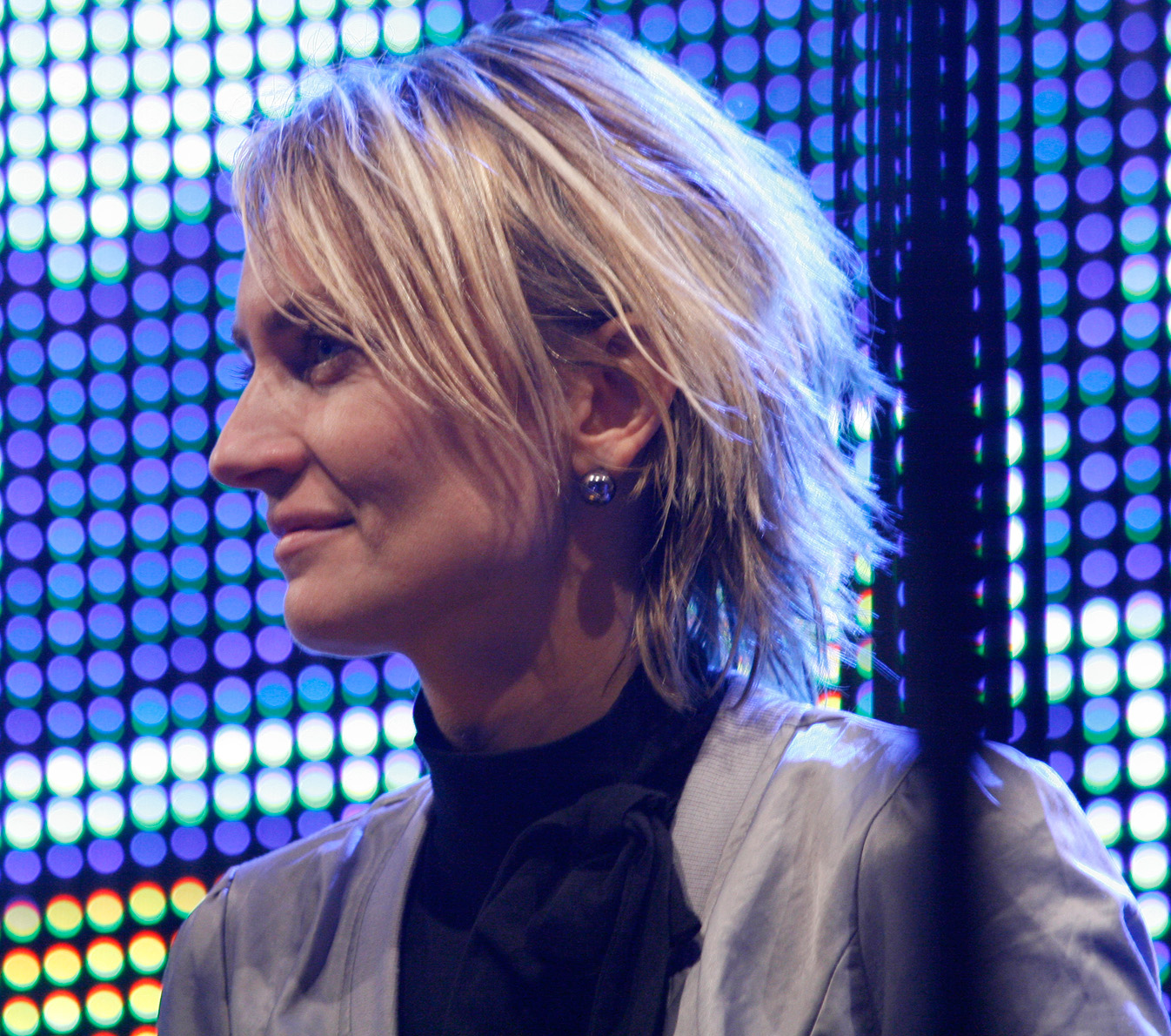 Helene Jarmer (Vienna Night Run 2009, Wien)